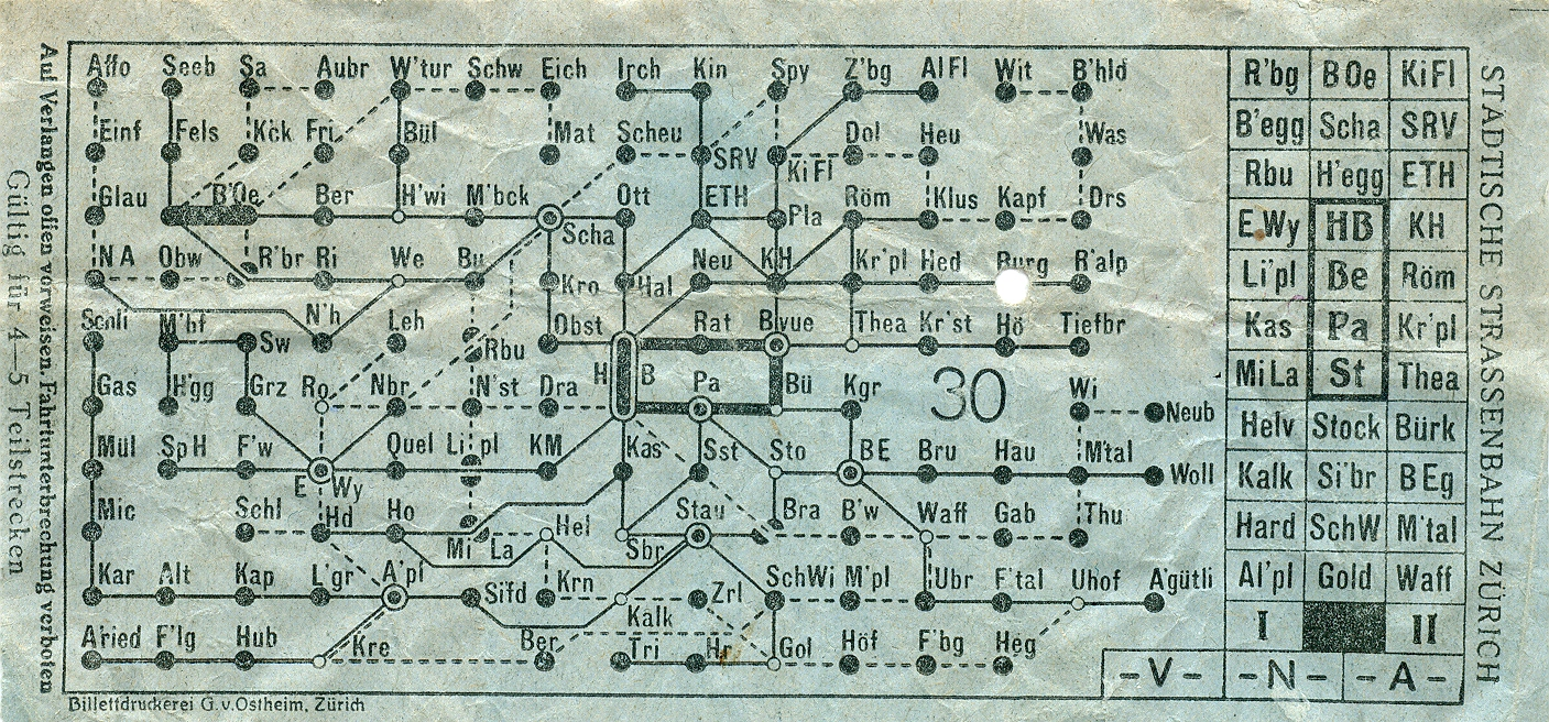 Billet der Verkehrsbetriebe Zürich mit Linienplan und Entwertungsloch bei der Station Burgwies. Die durchgezogenen Linien symbolisieren Tramlinien, die unterbrochenen Linien Trolley- oder Dieselbuslinien. Muss nach 1944, aber vor 1954 in Gebrauch gewesen sein, da einerseits bereits die (Trolley-)Buslinie bis zum Utohof (Uhof), aber noch die Tramlinie 1 (Hardplatz-Rehalp, z.B. die Strecke Kaserne-Hohlstrasse "Kas - Ho" oder Kunsthaus - Kreuzplatz "KH - Kr'pl") verzeichnet ist. Da ab 1950 der Name «Verkehrsbetriebe der Stadt Zürich» üblich war, müsste es aus der zweiten Hälfte der 1940-er Jahre stammen.